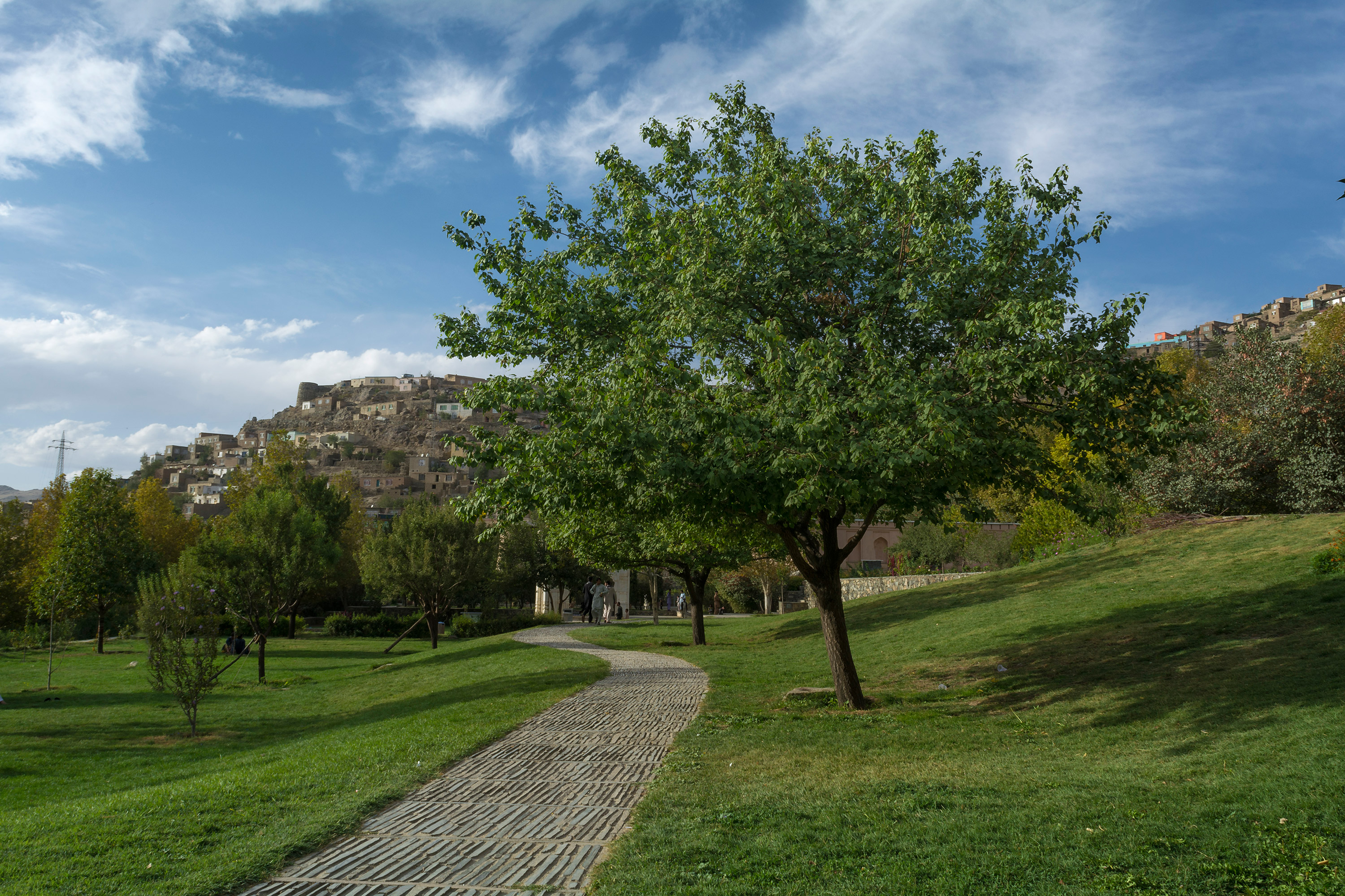 باغ بابر در فصل تابستان